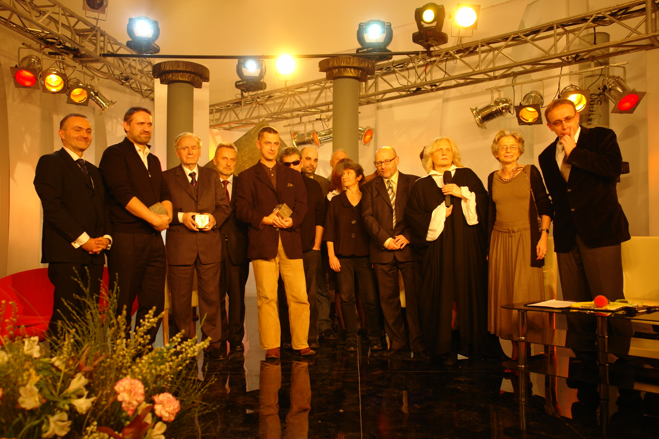 Laureaci NLG A.D. 2007 oraz członkowie Kapituły podczas uroczystej Gali Finałowej.